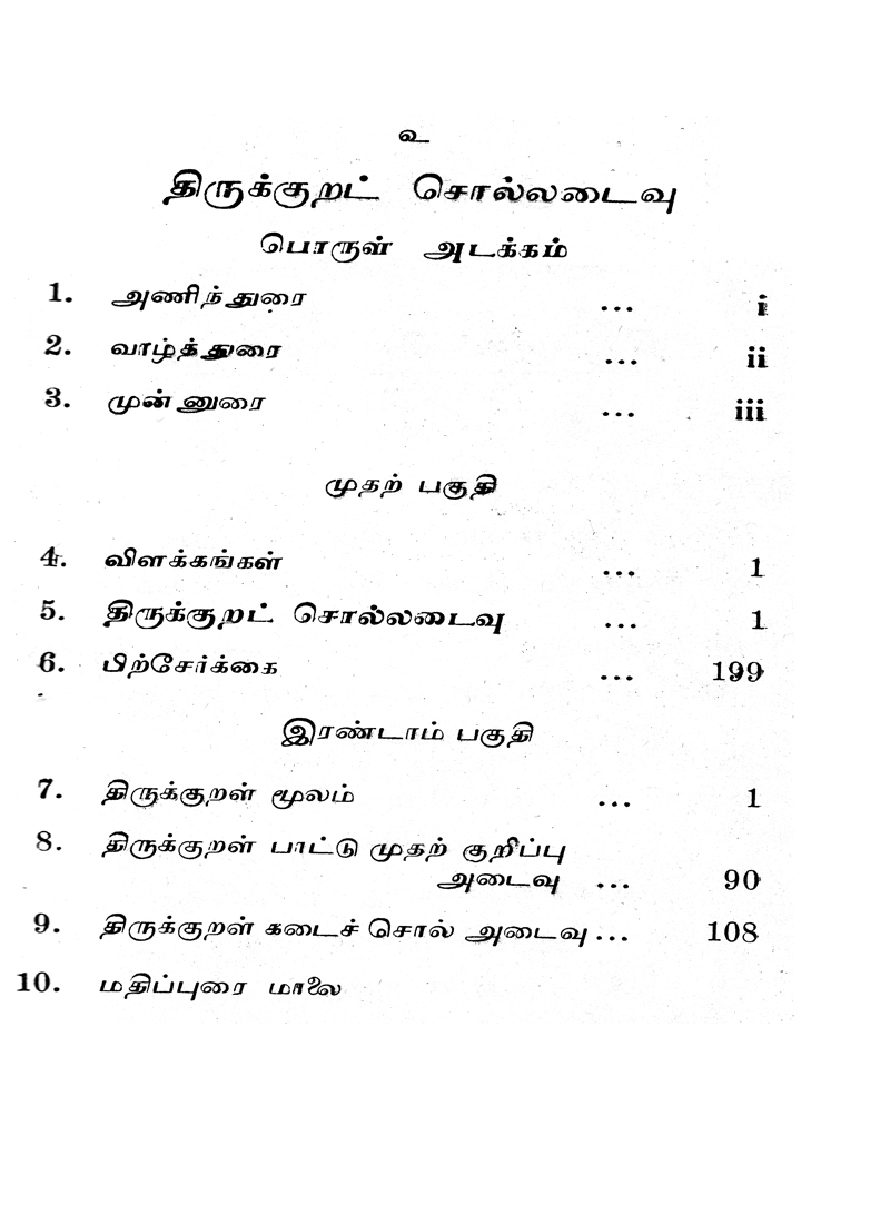 திருக்குறள்-சொல்லடைவு-1-பொருளடக்கம். இந்நூல் 1952 உருவாக்கப்பட்டதால், காப்புரிமை எதுவும் இல்லை. ஏனெனில், ஒரு படைப்பு உருவாக்கப்பட்டு 60 ஆண்டுகள் ஆனால், இந்தியாவில் பொதுவுக்கு உருவதாக இந்திய சட்டம் கூறுகிறது.